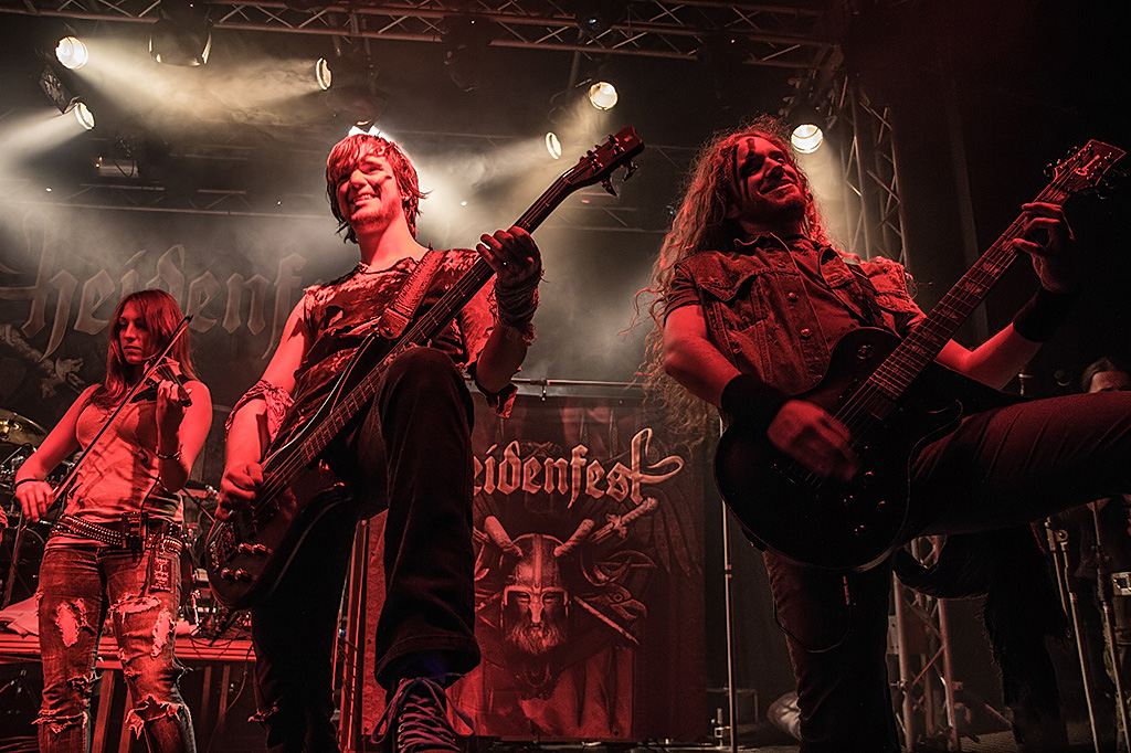 Krampus - Heidenfest - 2.11.2012 Geiselwind